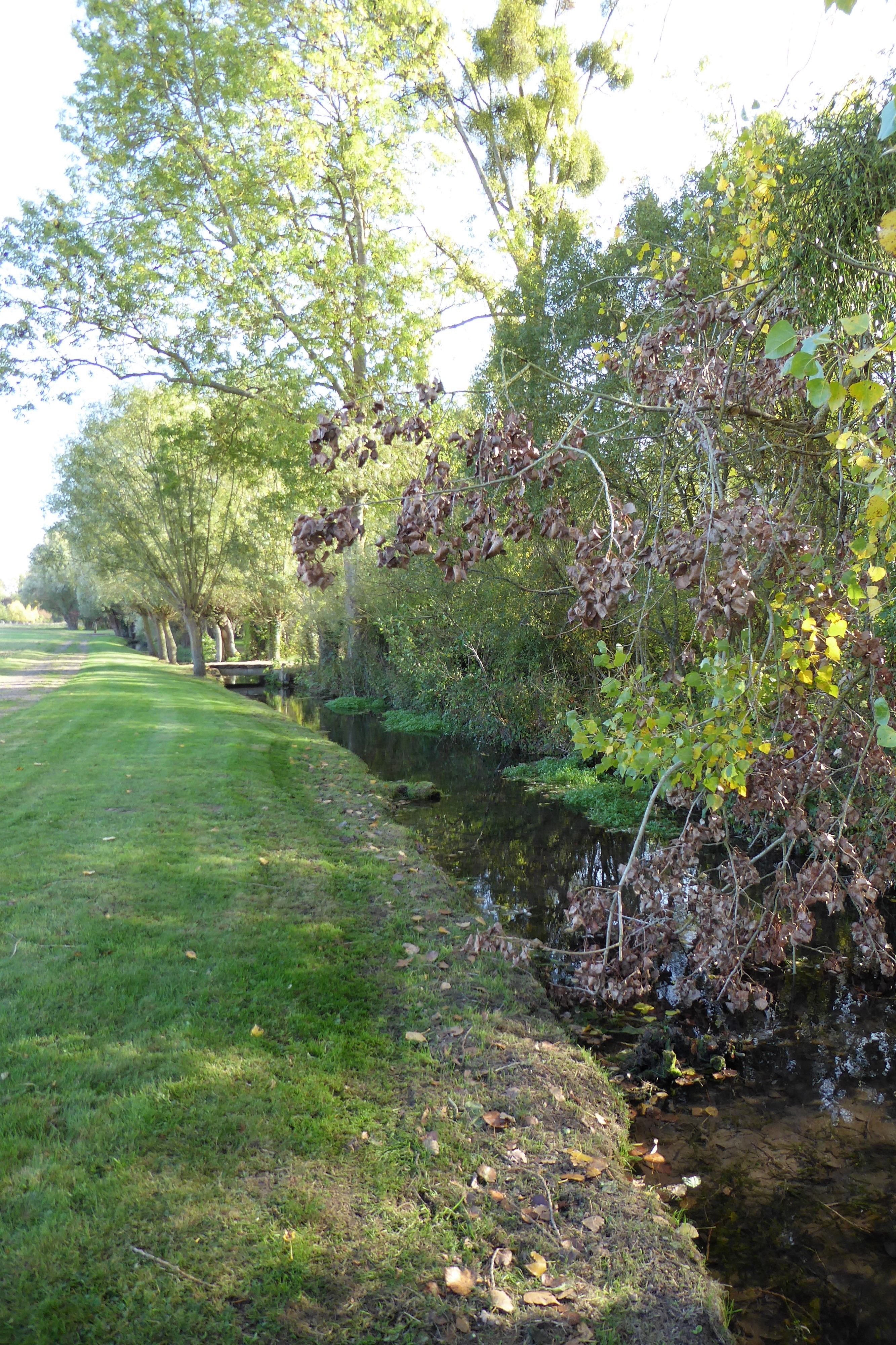 la Maltorne près de la chapelle Sainte-Geneviève, Senantes, Eure-et-Loir, France.